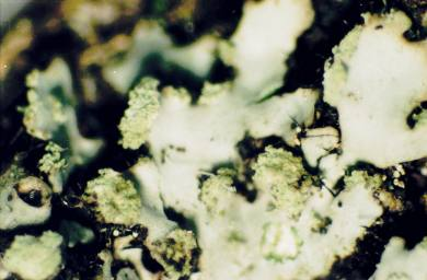 Phaeophyscia pusilloides